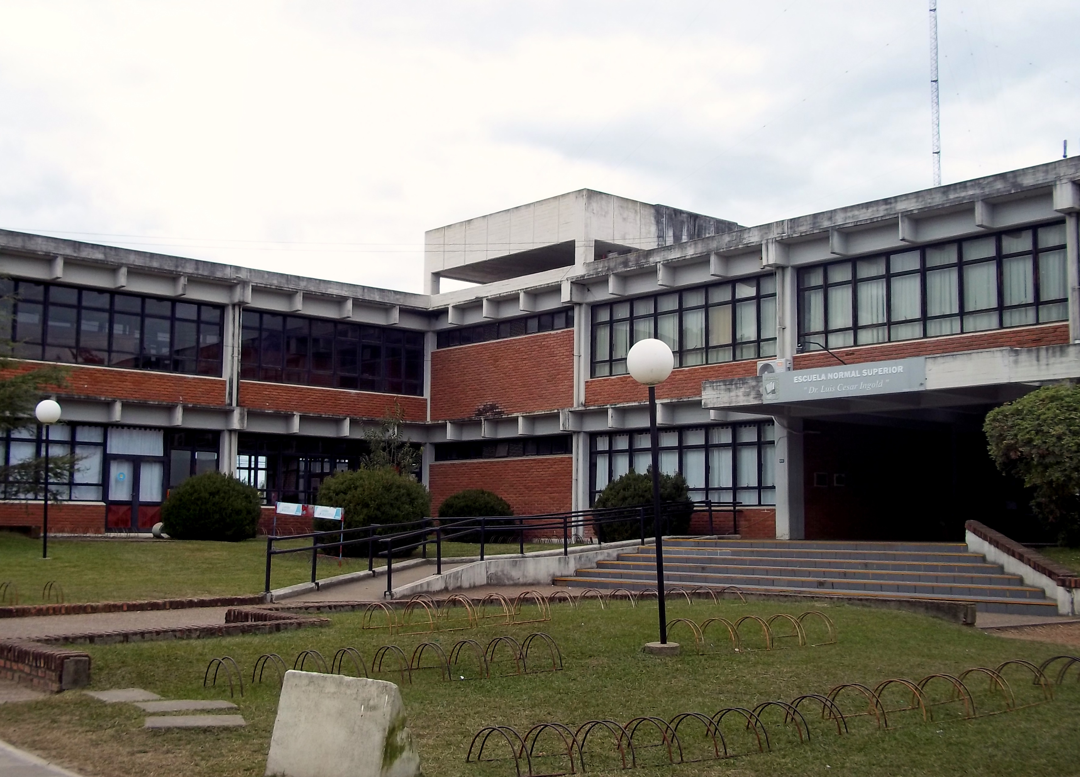 Escuela Normal Superior «Dr. Luis César Ingold» (Villa Elisa, Entre Ríos)